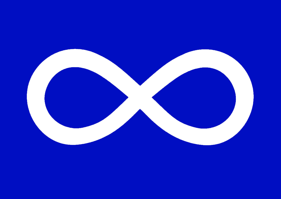 Blue Metis flag